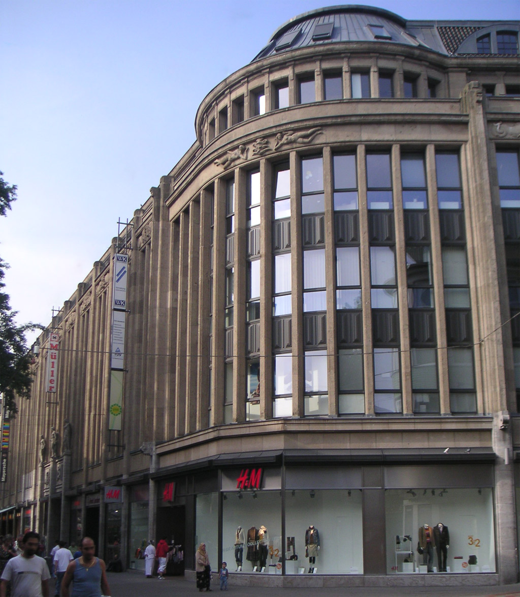 Beschreibung: Das WeKa-Karee (Westfalen Kaufhaus) in der Gelsenkirchener Innenstadt auf der Bahnhofsstraße. Description: The WeKa-Karee in the inner-city of Gelsenkirchen. Quelle/Source: Fotografiert am 1. September 2004 Fotograf: Marc Schuelper